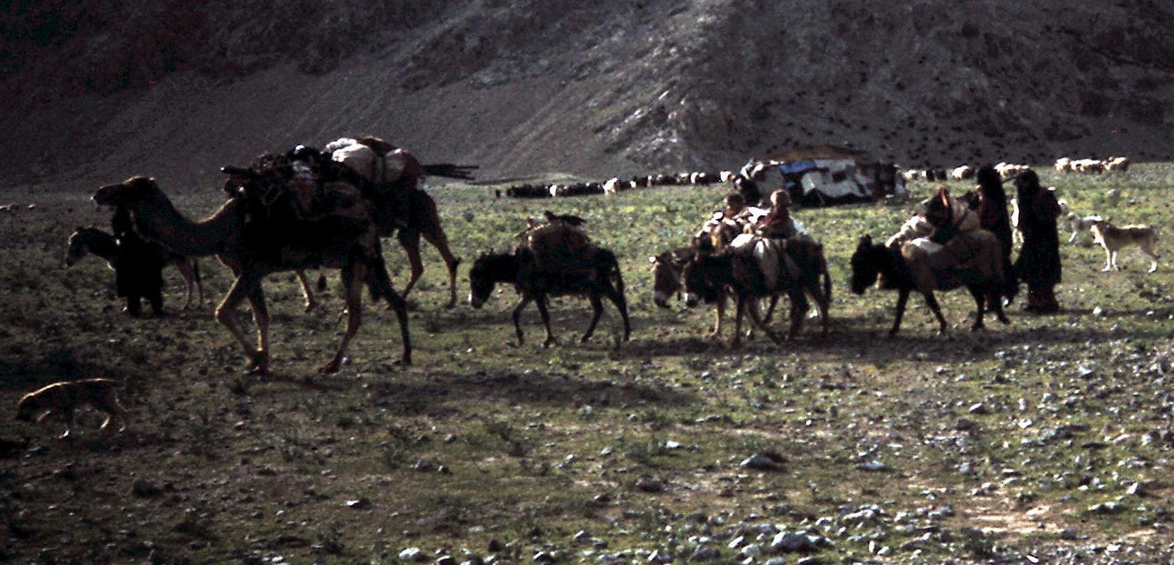 Nomaden in Baluchistan